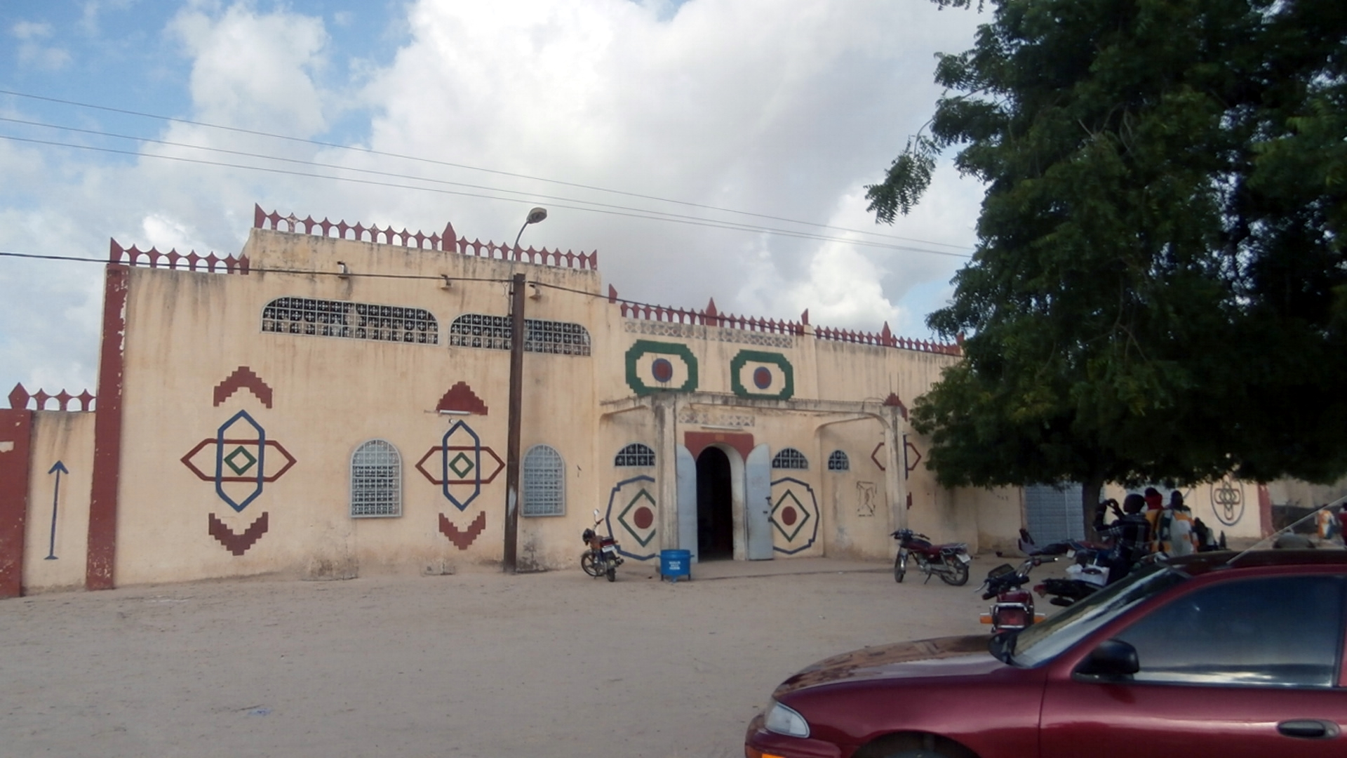 le batiment du sultanat de Katchina Maradi